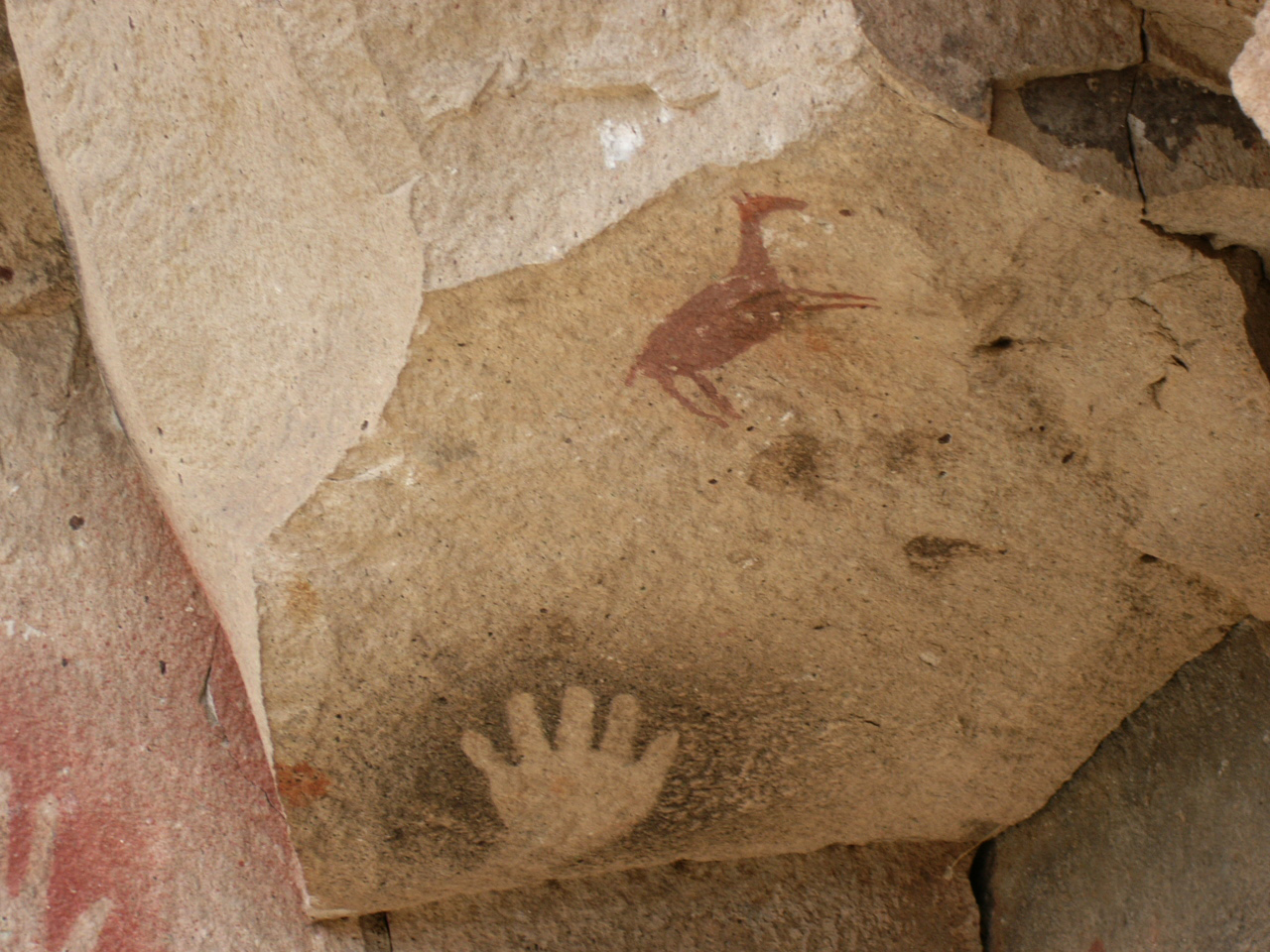 Cueva de las Manos - Detalle de una de las rocas interiores